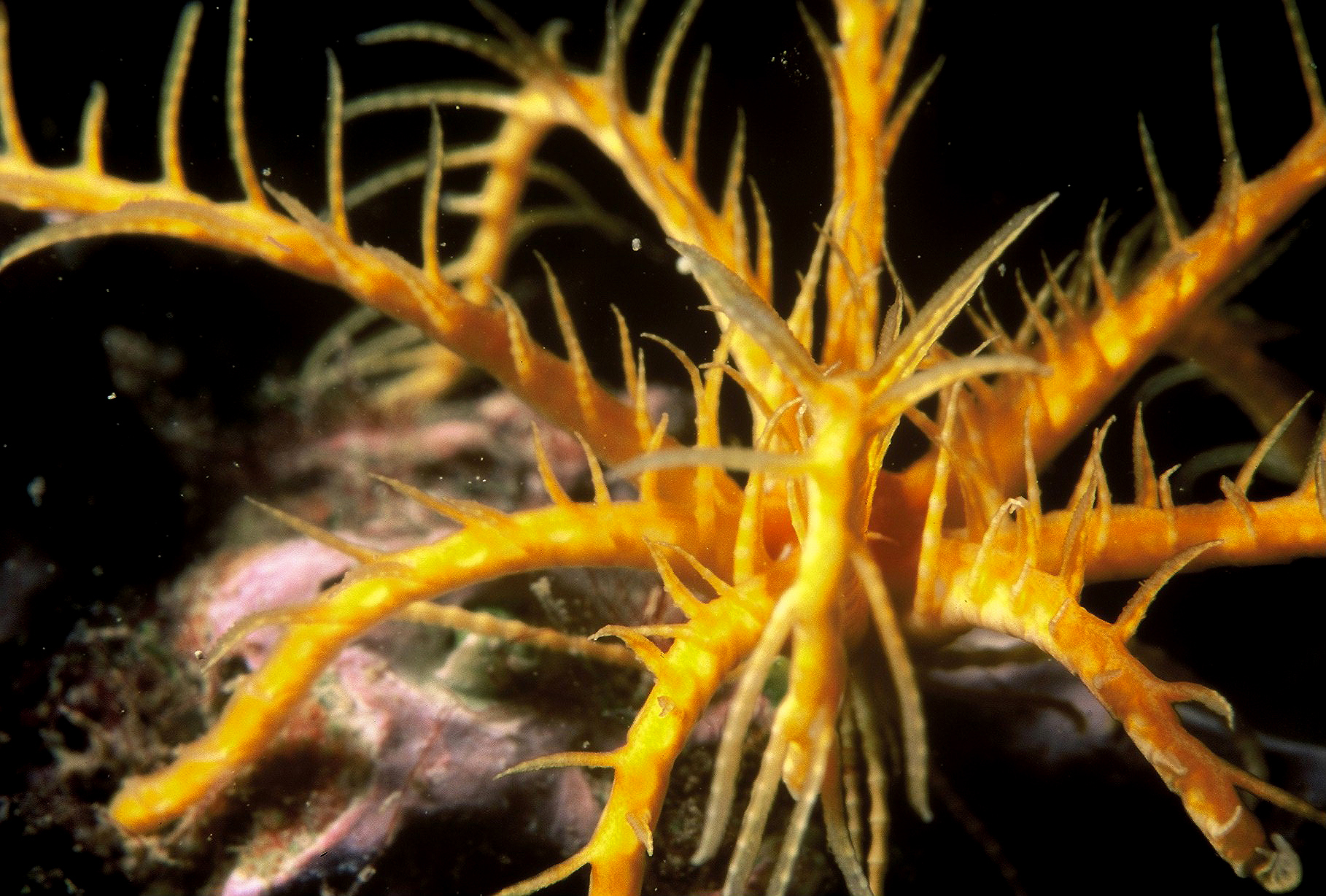 cette comatule de couleur jaune est aussi très fragile et le fait de vouloir la "détacher" de son support, peut la briser en plusieurs morceaux. Il faut toucher avec les yeux.